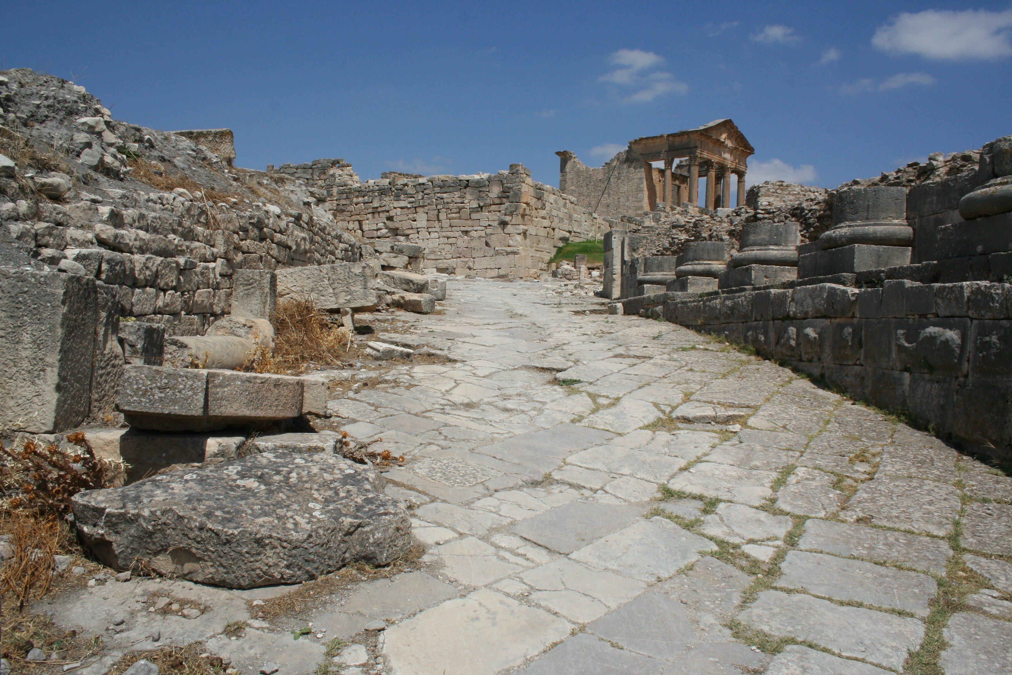 voie vers Ain Doura, à droite façade du temple des victoires de Caracalla